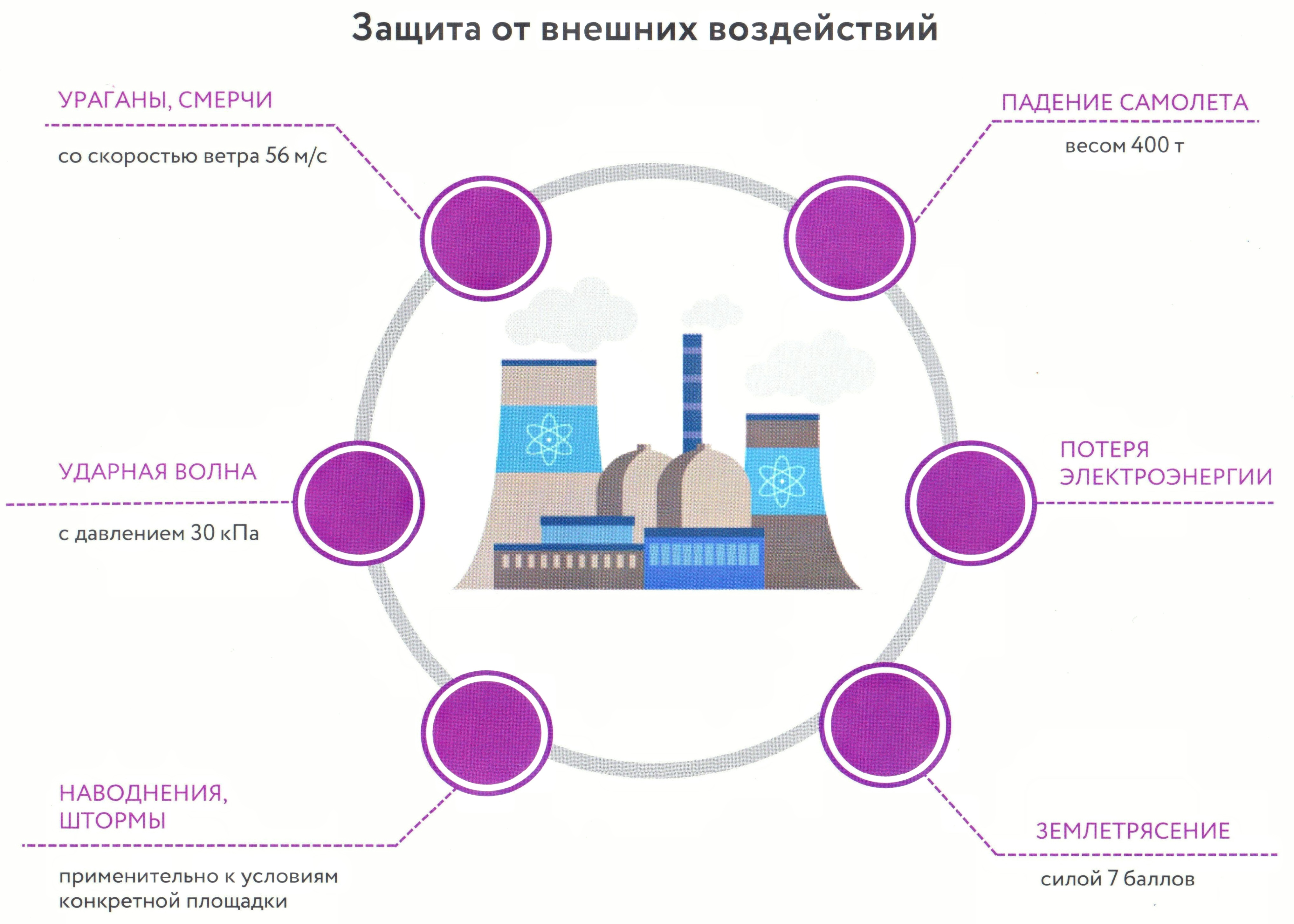 Защита от внешних воздействий